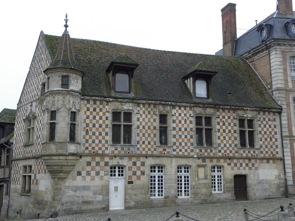 Maison de la renaissance à Verneuil-sur-Avre (27).